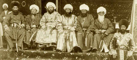 Четвертый справа — Мухаммад Шариф инак. Фото Ордэ, конец 1880-х г.г. Бухарский эмират